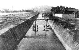 台北防災設施